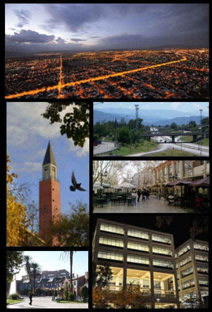 Muestra sintética de las principales características de la Ciudad de San Juan, Argentina.